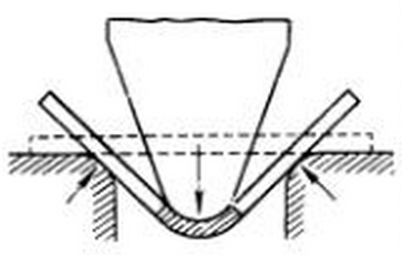 Կորացման սխեմա